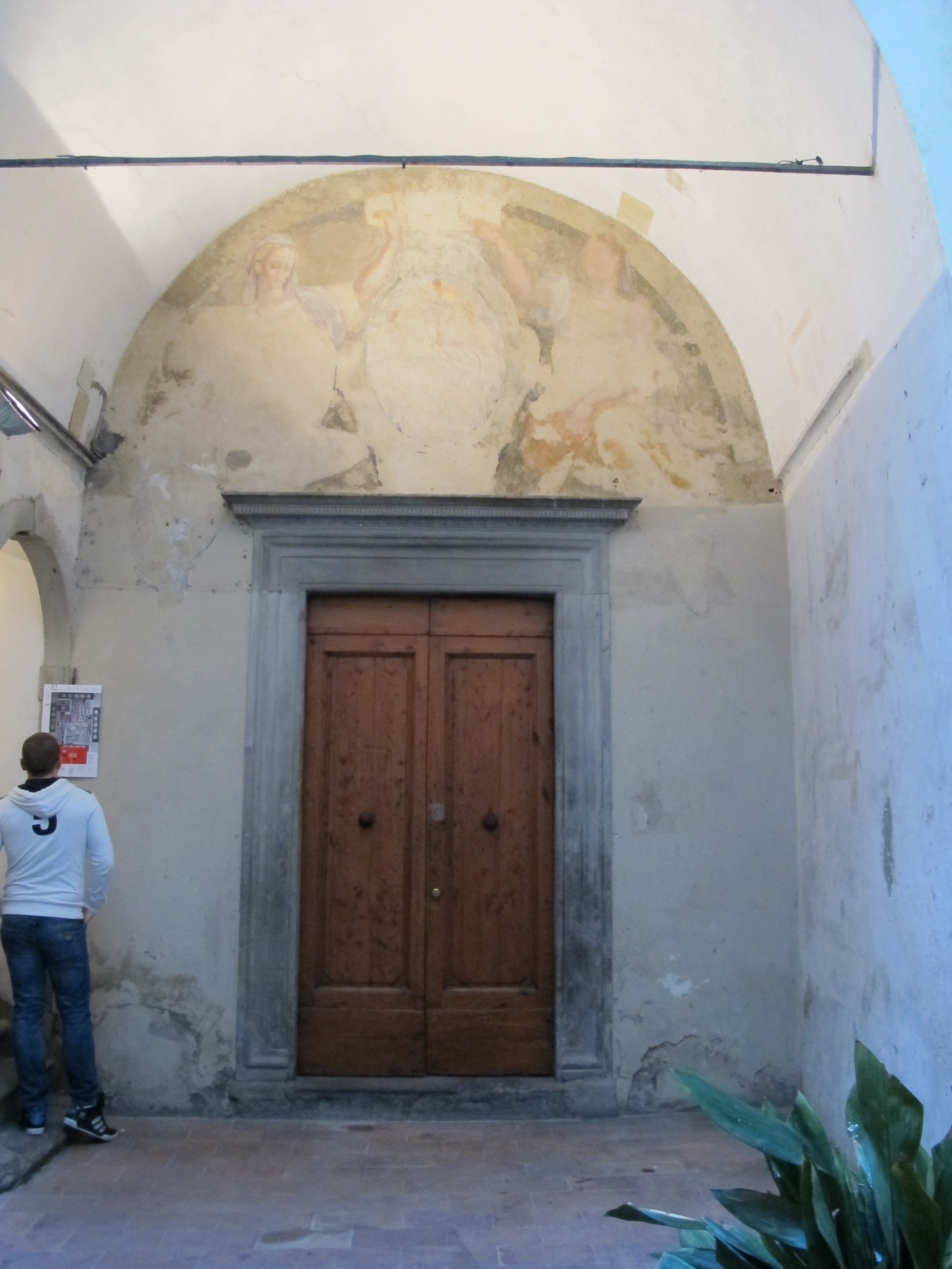 Casa di vasari, fi, affresco nel cortile